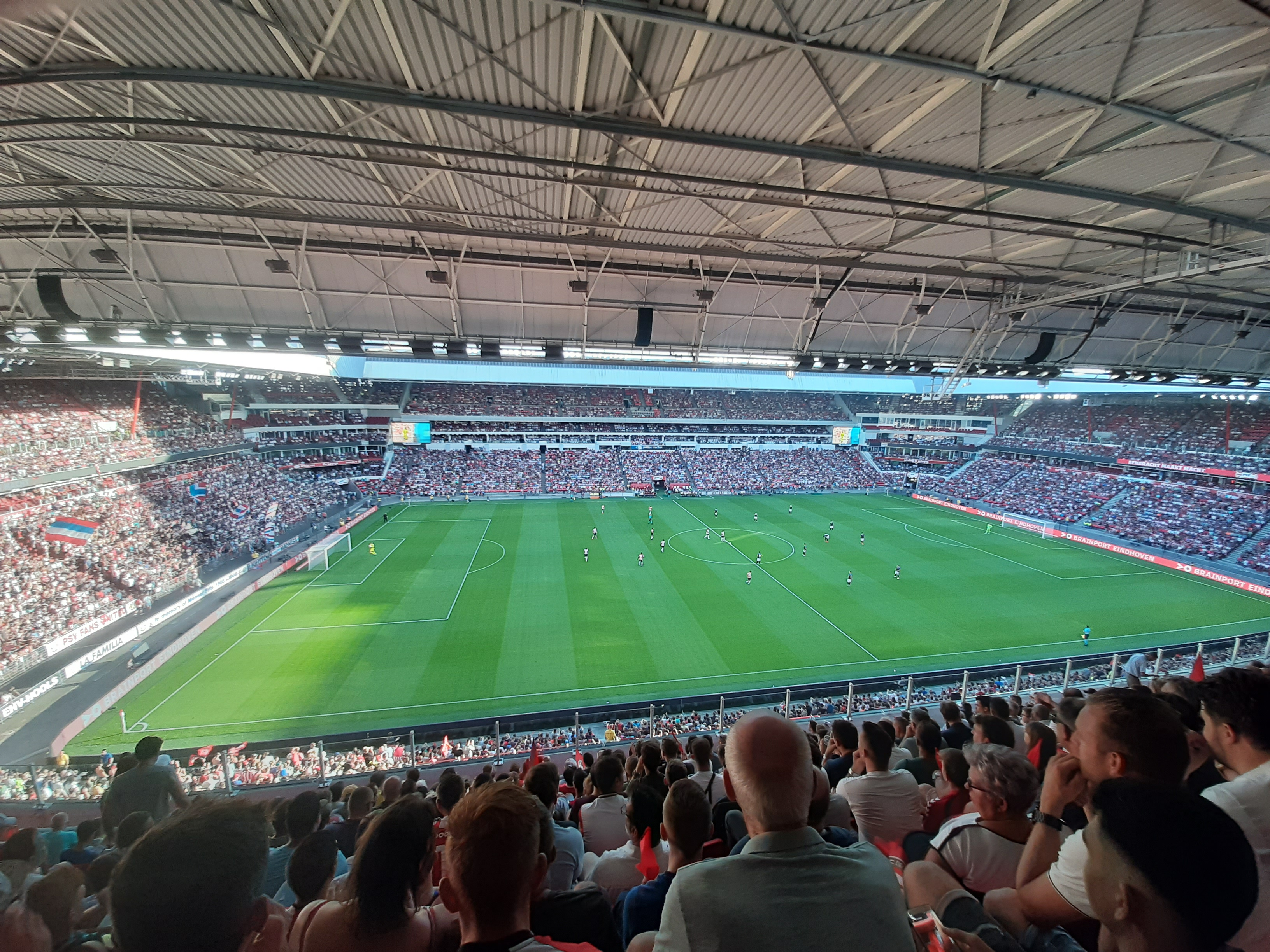 Philipsstadion